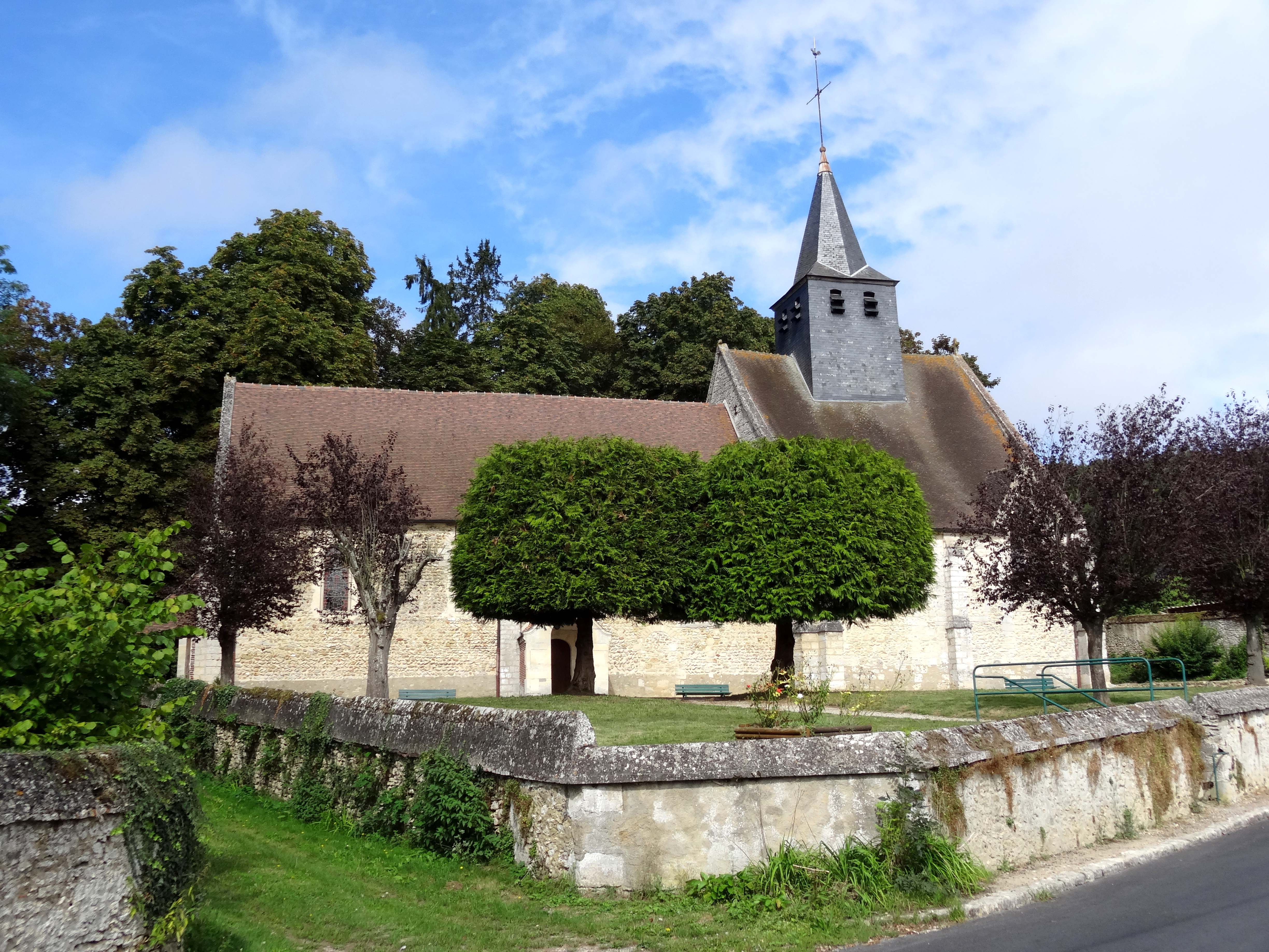 Église Saint-Remi de Ponchon - voir titre.